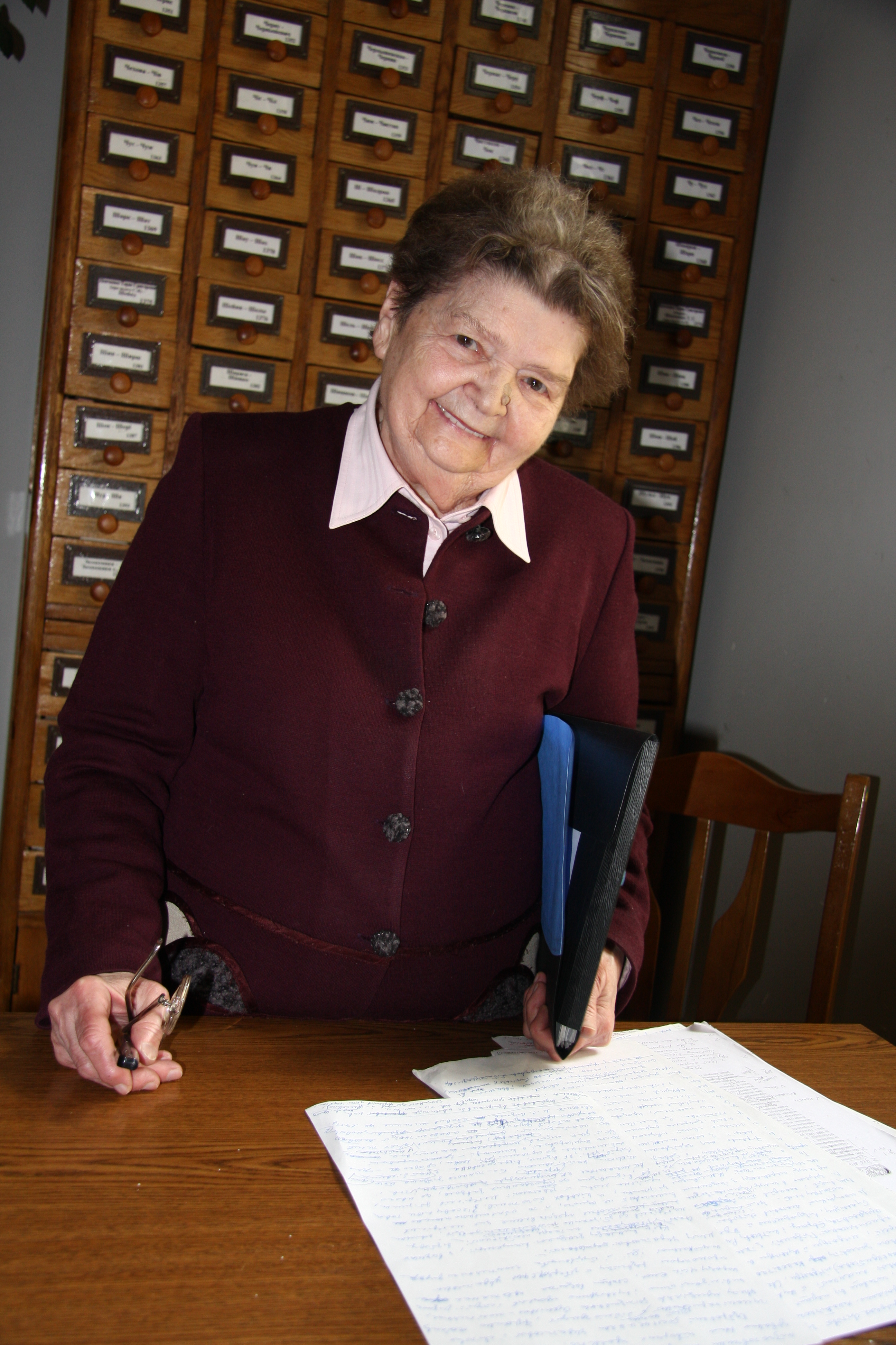 Walo Maria, ukraińska bibliograf. Вальо Марія Андріївна, український бібліограф. Walo Maria, Ukrainian bibliographer.